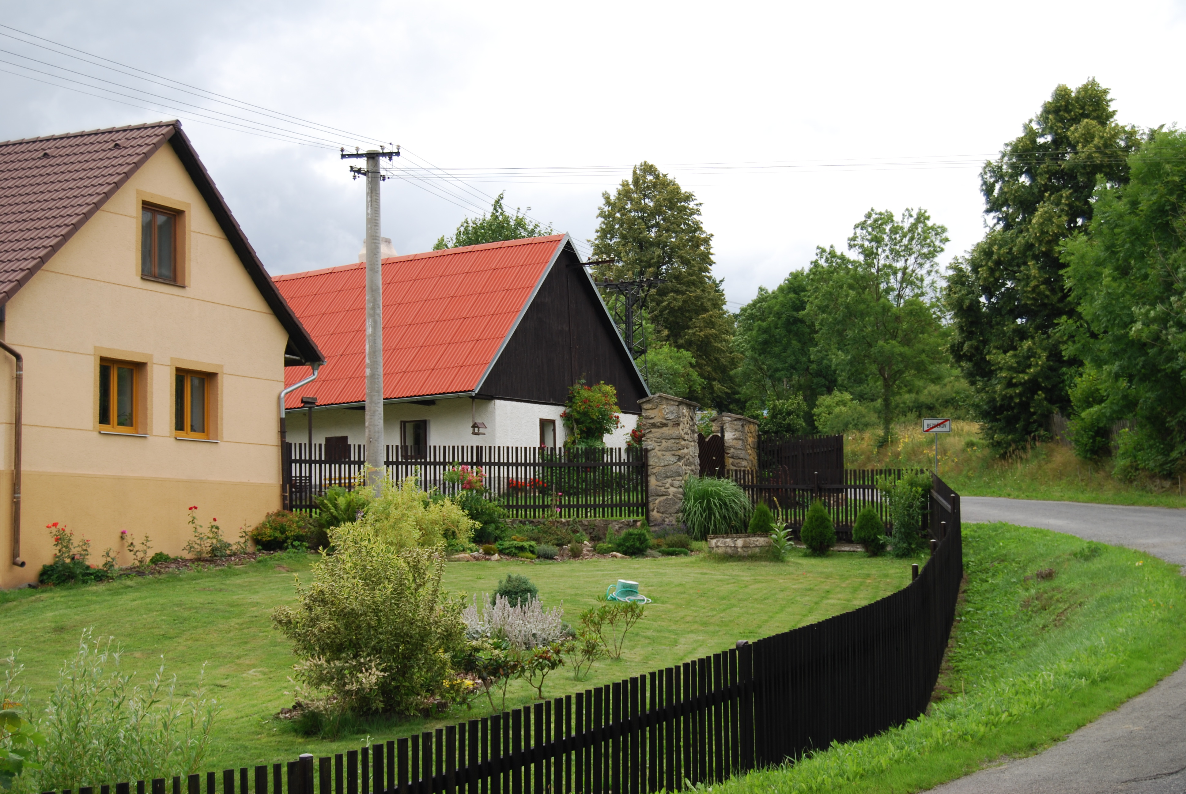 Pohled na část obce. Bezděkov (Nadějkov). Okres Tábor. Česká republika.